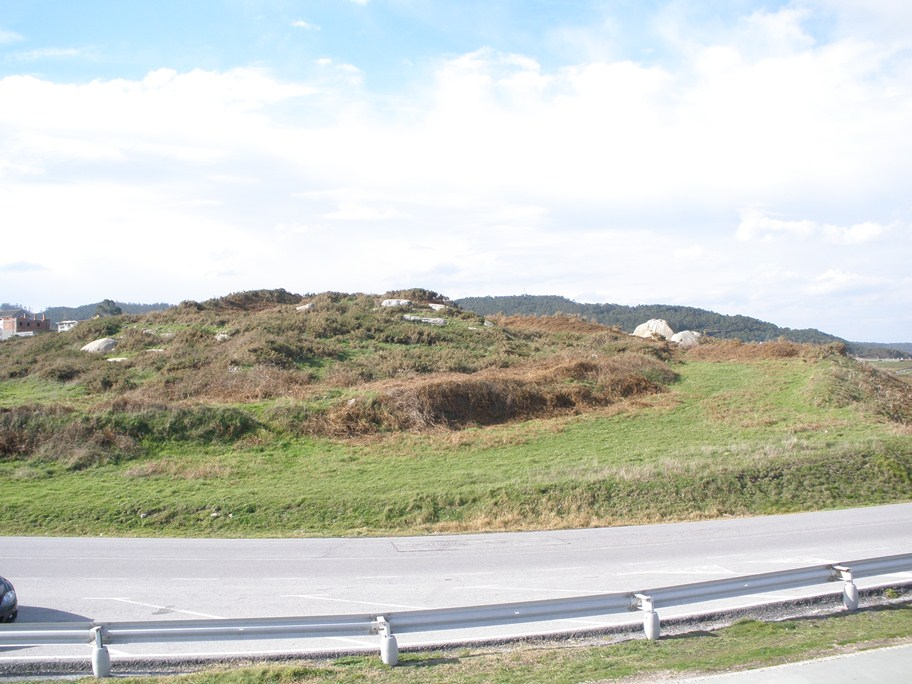 vista do castro de Burela desde la carretera cercana